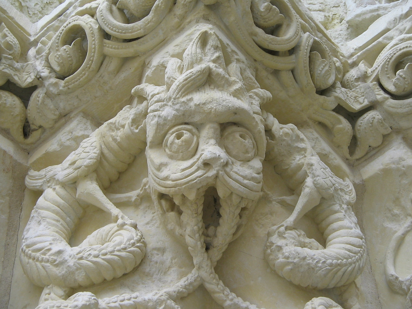 Détail sur le porche de l'église d'Argenton-les-Vallées (79) en avril 2011